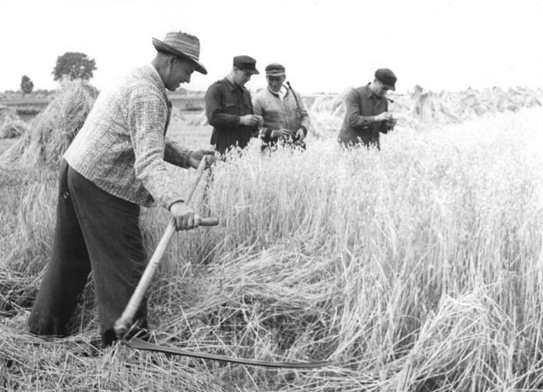 Botrum, Begutachtung von Getreide Zentralbild Weiß 13.8.1956 Operative Arbeit des MTS-Beirates in Thürkow Ein gutes Beispiel für die Arbeit der MTS-Beiräte im Bezirk Neubrandenburg gibt der Beirat der MTS Thürkow, Kr. Teterow, dem rund 20 ( zwei null) Mitglieder angehören. Besonders aktiv arbeitet der werktätige Einzelbauer Otto März aus Groß-Roge, Ortsteil Wotrum mit, der dem MTS Beirat seit sieben Jahren angehört. Wöchentlich hat er mit dem Brigadier der MTS Aussprachen und regelmässig kontrolliert er die Arbeit der Traktoristen. Er trug mit zur Gründung der vier ständigen Arbeitsgemeinschaften in Wotrum bei und überzeugte sie vom Vorteil des Abschlusses eines Sammelarbeitsvertrages mit der MTS. UBz: V.r.n.l.: Bauer Otto M ä r z, MTS-Beiratsmitglied MTS-Brigadier G r a ß und Mähdrescherfahrer Seemann prüfen einen Haferschlag des werktätigen Einzelbauern Drews ( l.v.l.), Mitglied einer Arbeitsgemeinschaft in Botrum. Bauer Drews mäht den Haferschlag an, weil Mähdrescherfahrer S e e m a n n am nächsten Tag hier mit dem Mähdrusch beginnen will. Die Arbeitsgemeinschaften aus Wotrum wollen bis zum 31.8.1956 die Getreideernte und die Ablieferung beenden.